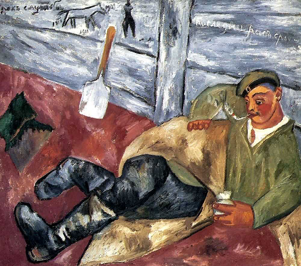 Ларионов М.Ф. «Отдыхающий солдат». 1911 г. Холст, масло 119 х 122 см. Государственная Третьяковская галерея